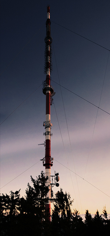 Transmitter